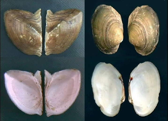 Hyriidae (Paxydon syrmatophorus) - Mycetopodidae (Anodontites trapesialis)